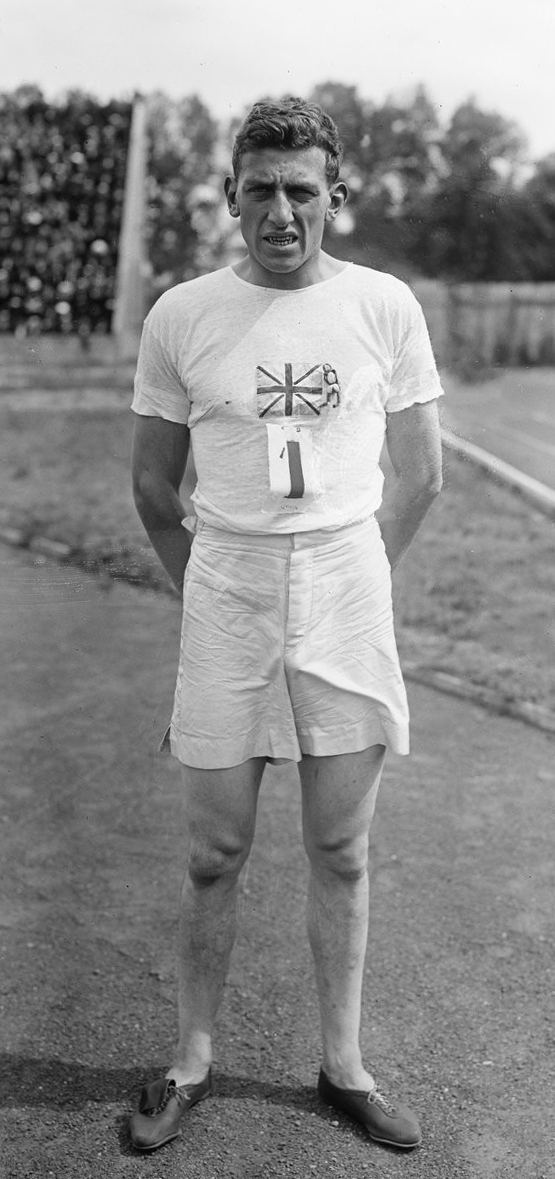 19/6/21, stade Pershing, Abrahams [relayeur de l'Achilles Club] : [photographie de presse] / [Agence Rol]